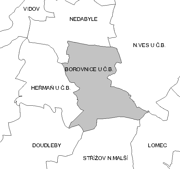 Katastr Borovnice